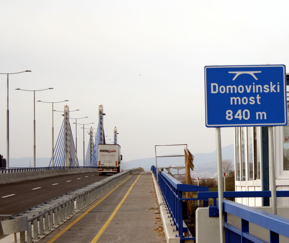 Domovinski most, Zagreb, Hrvatska